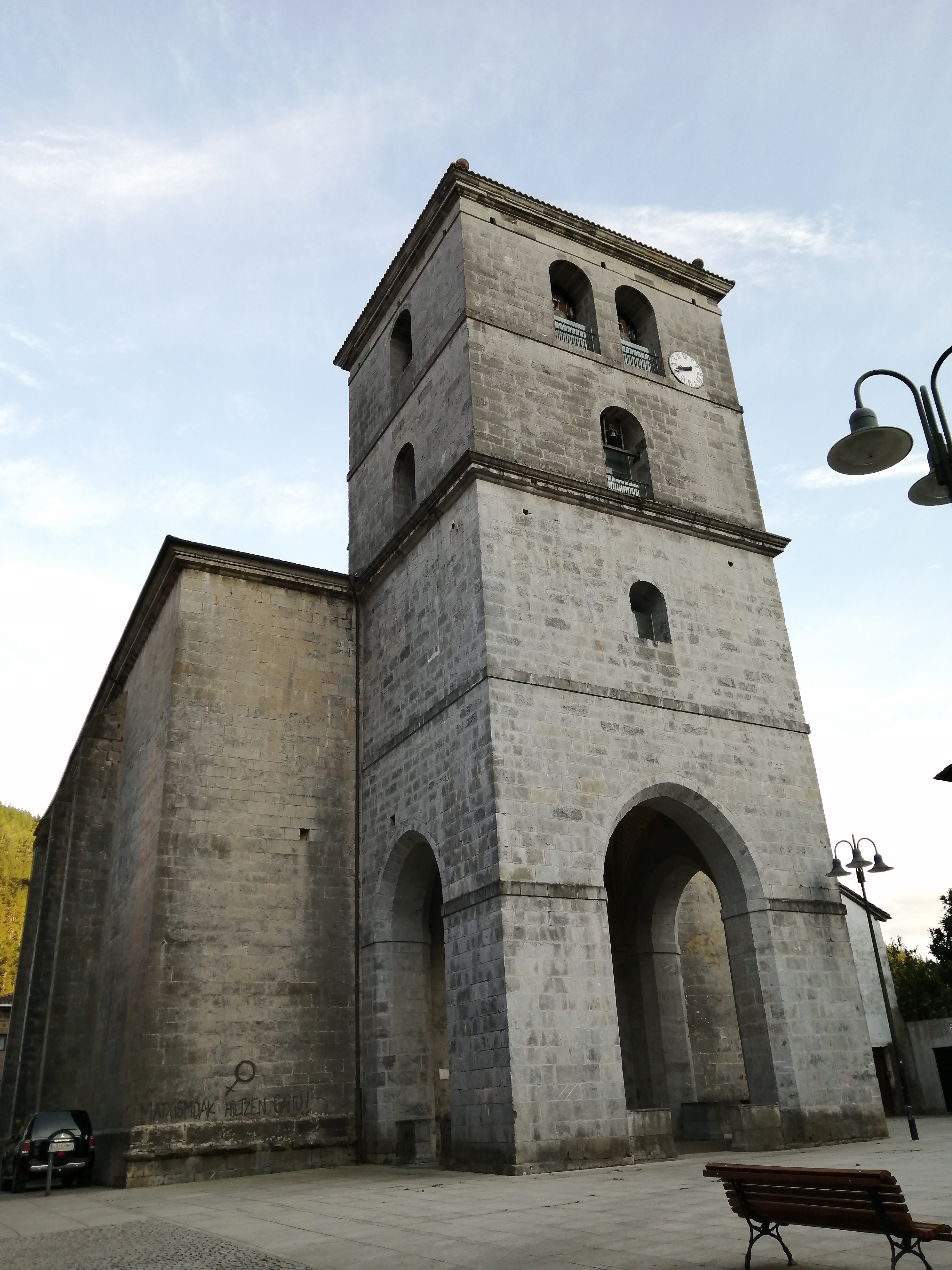 Aulestiko San Joan Bataiatzailearen eliza